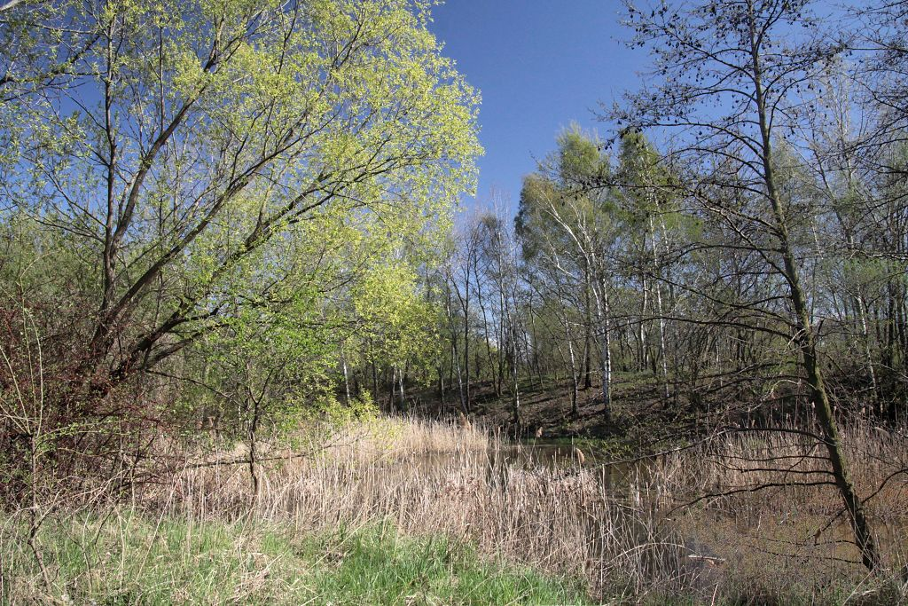 Přírodní památka Skalky u Hulína